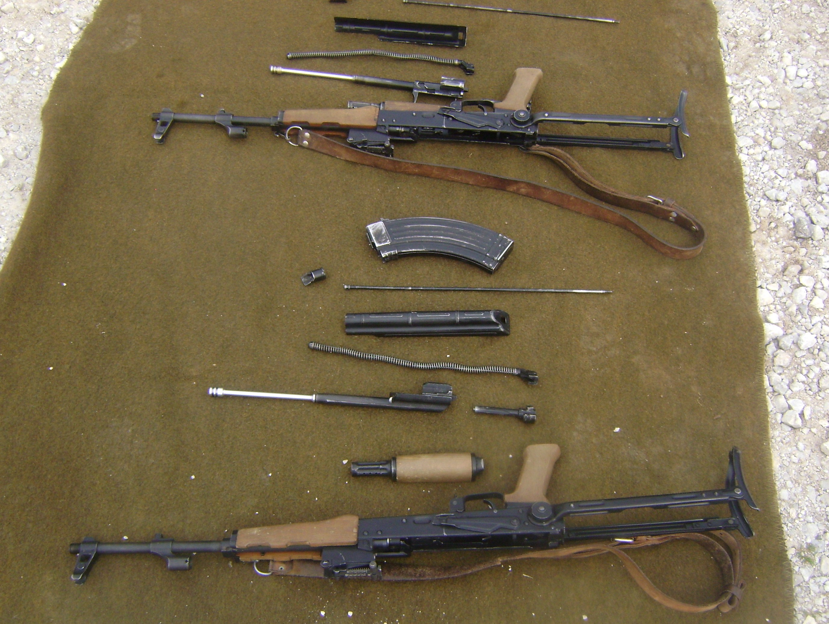 AKM auseinandergenommen